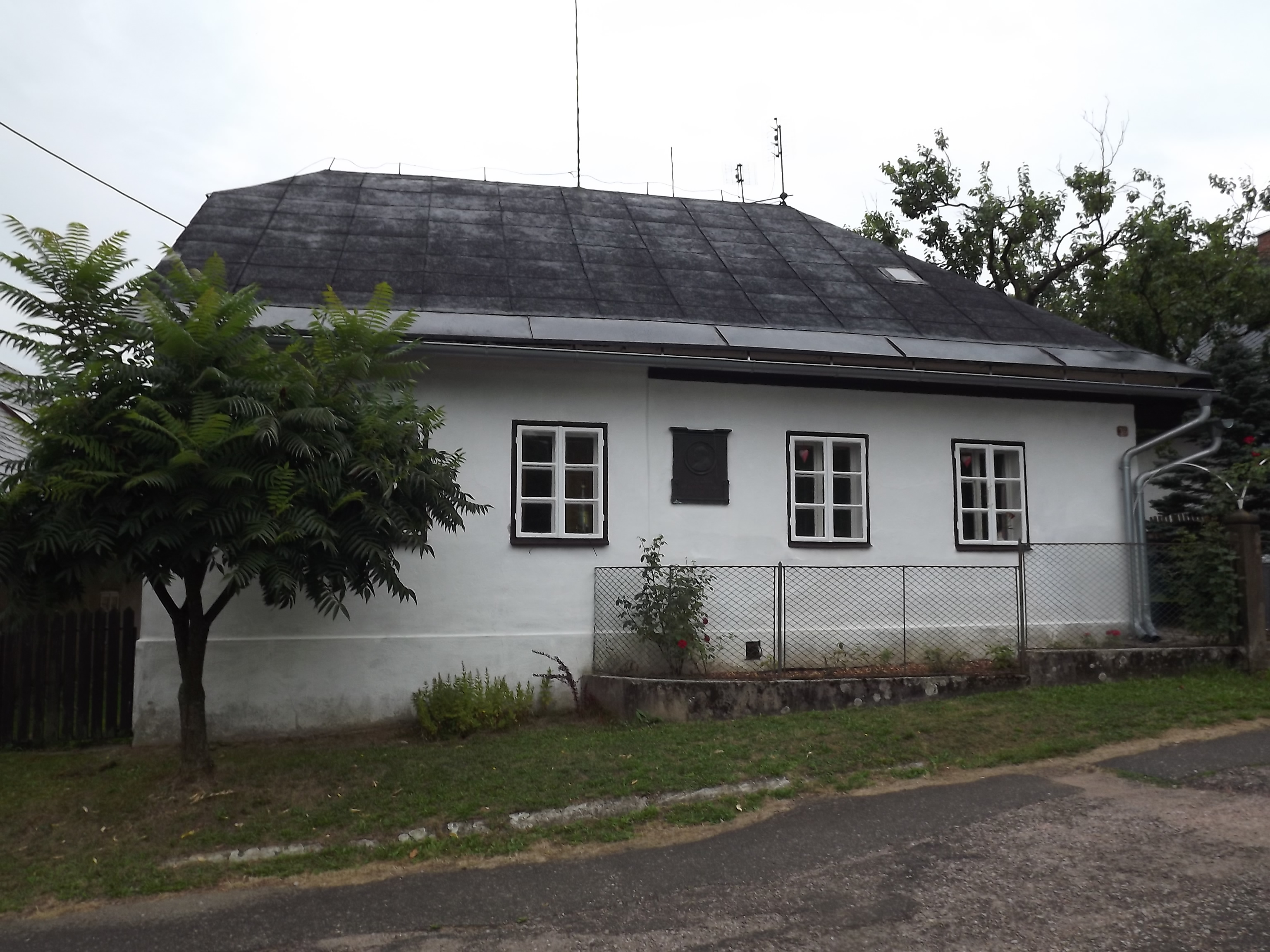 POtštejn